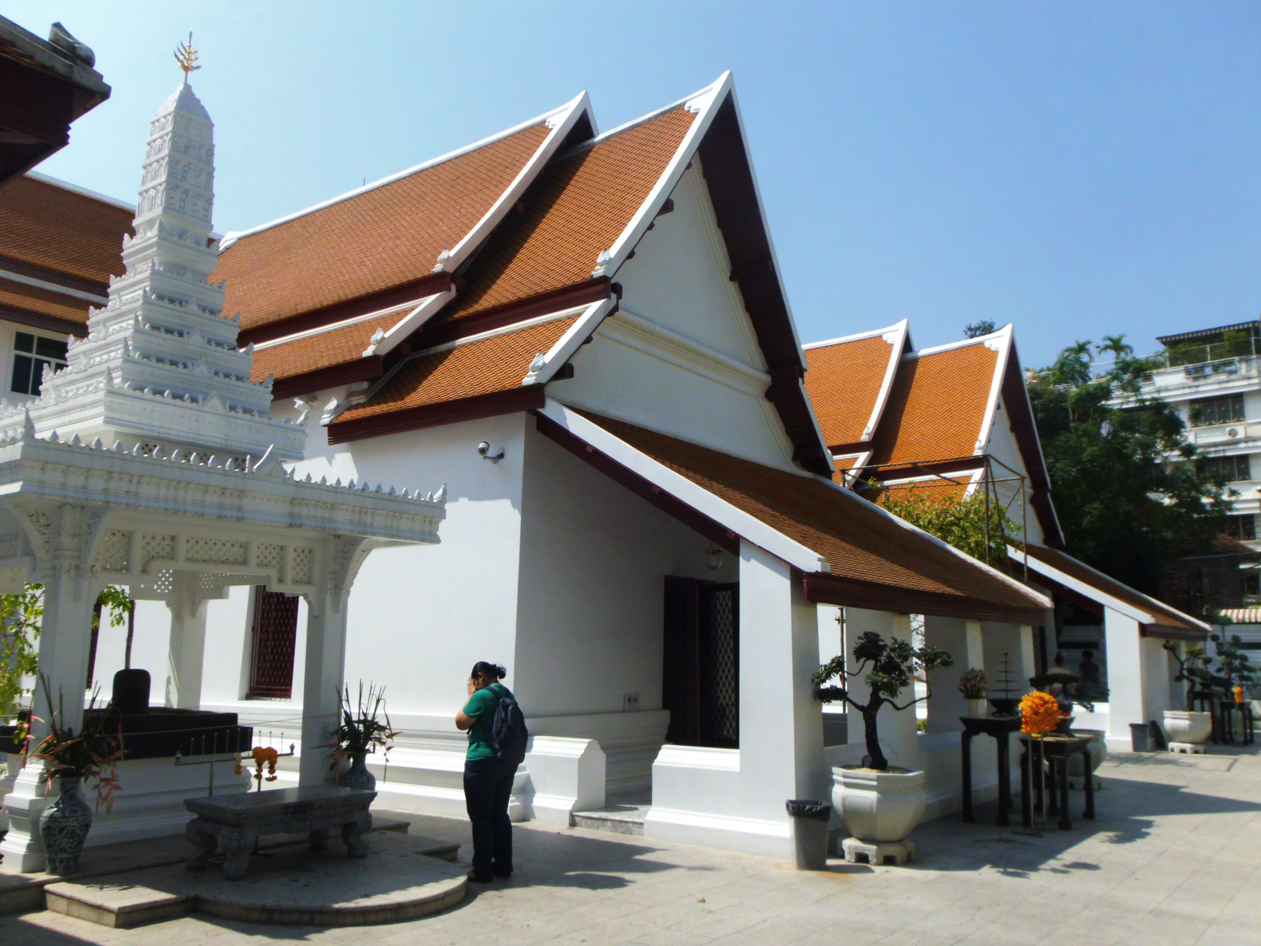 เทวสถานโบสถ์พราหมณ์